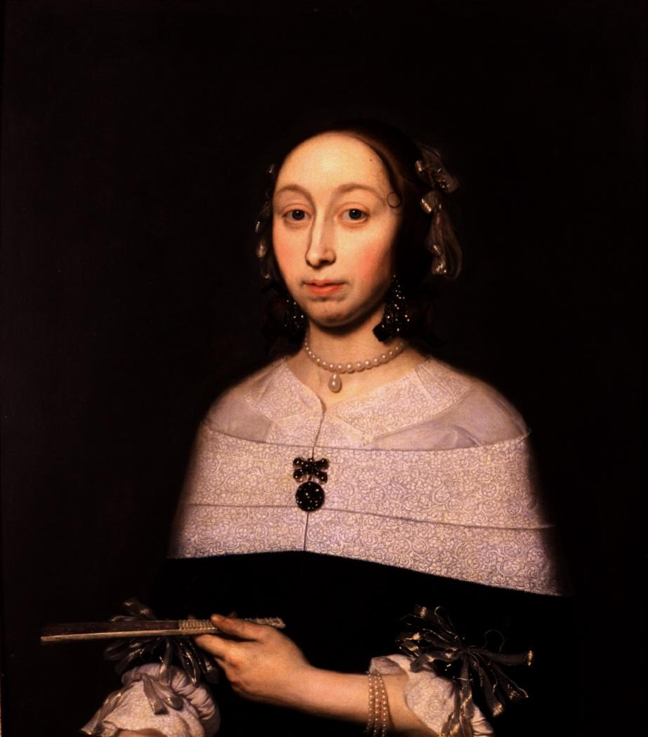 Retrato de dama, firmado "L.D. Jongh. F./A"